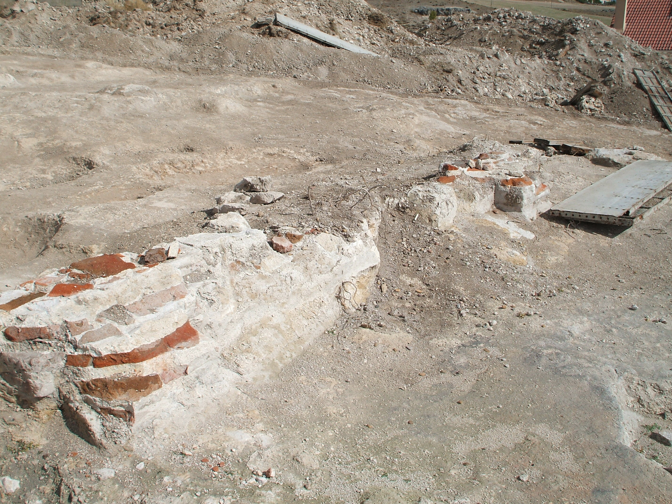 Restos de una iglesia mudéjar en Cuéllar (Segovia)